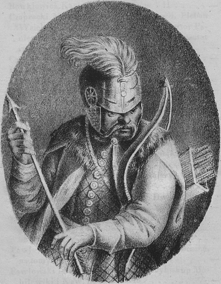 Беларуская (тарашкевіца): Уяўны партрэт вялікага князя літоўскага Сьвідрыгайлы (Śvidrygajła)